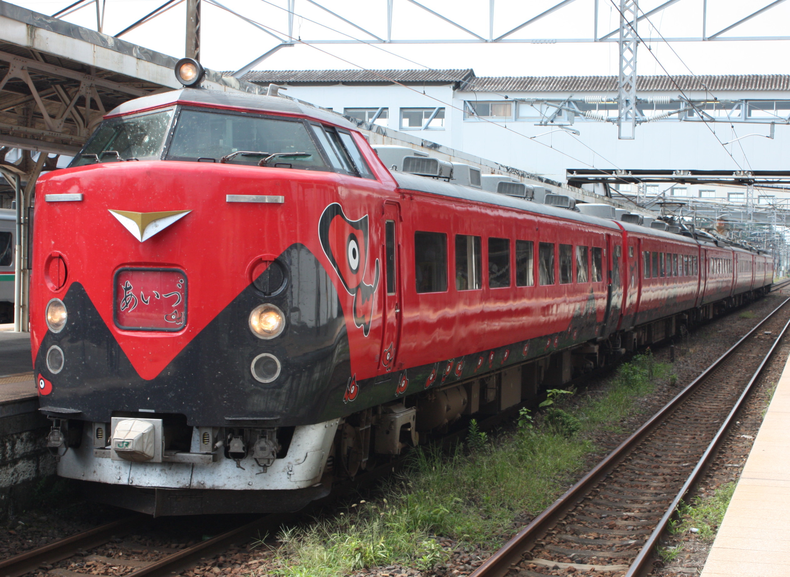 485系 あいづ専用車2006年改造 黒磯にて